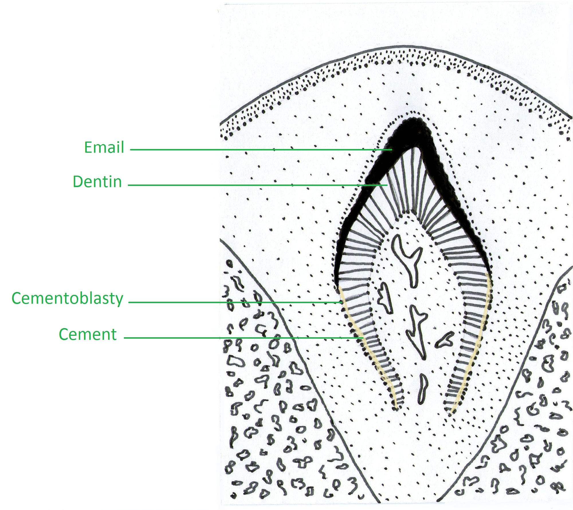 Perokresba zubu